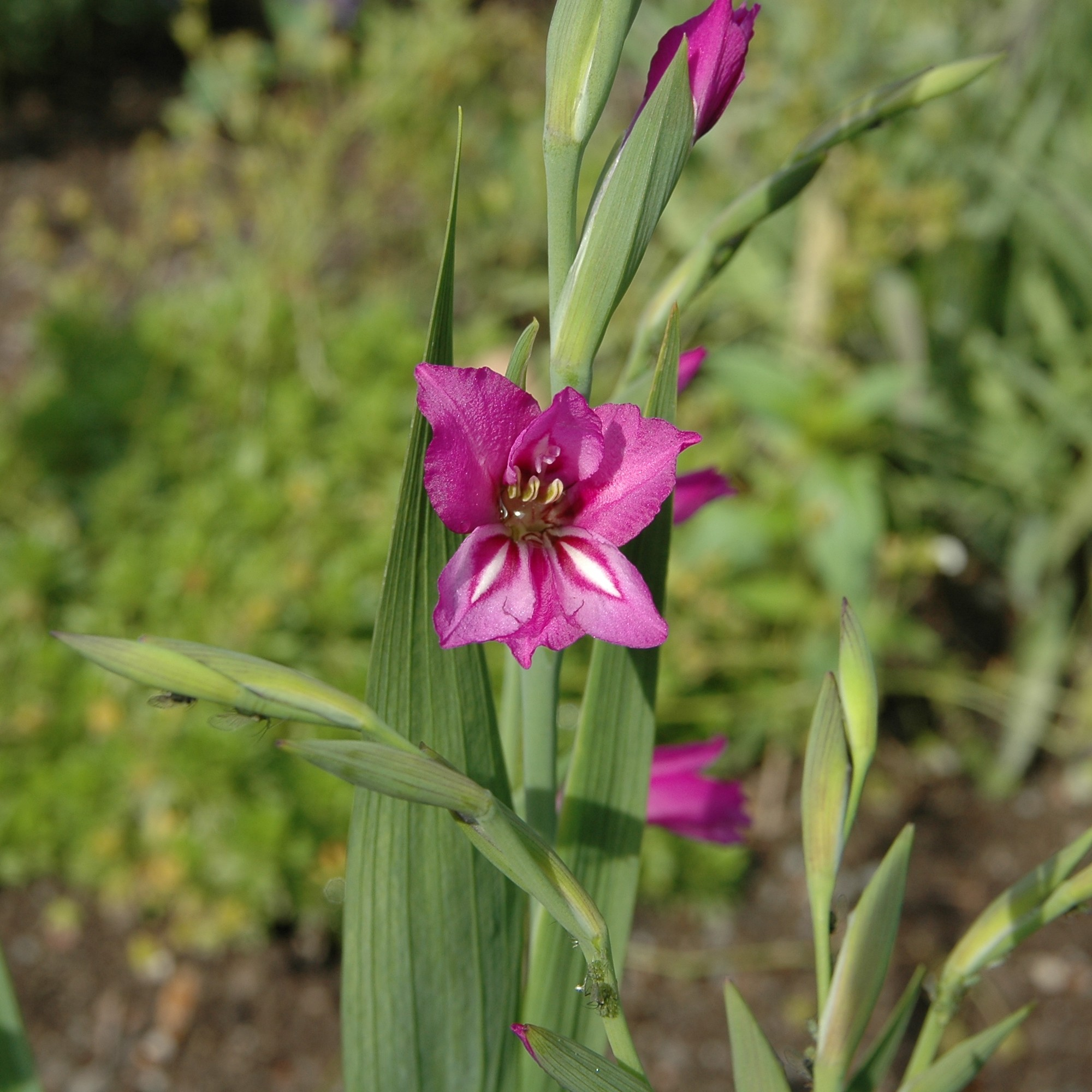 Gladiolus imbricatus in Västerås Botanical garden